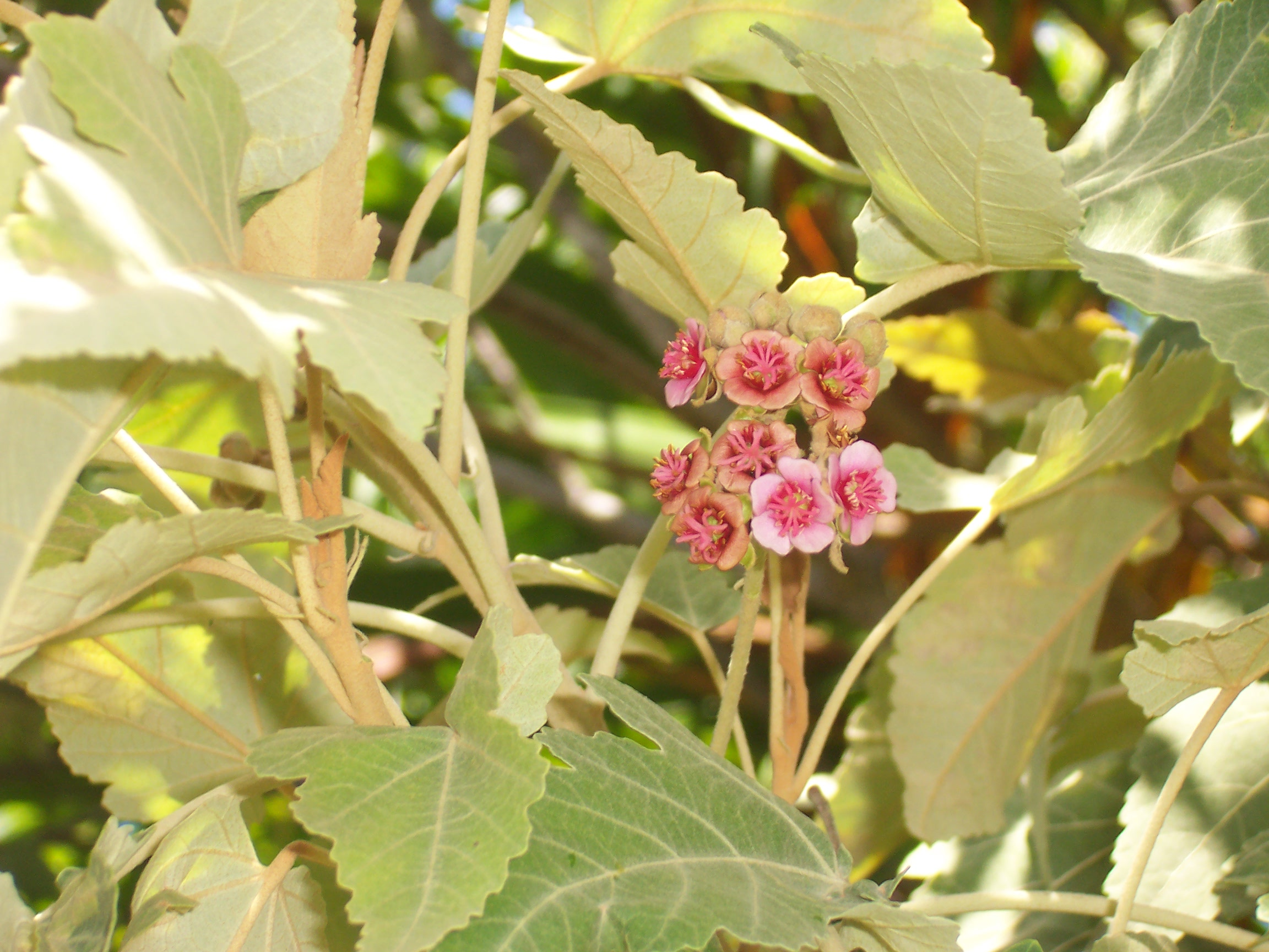 Bois de senteur blanc (Ruizia cordata) - fleurs Photo: B.navez -23 FEB 2006 - Réunion island